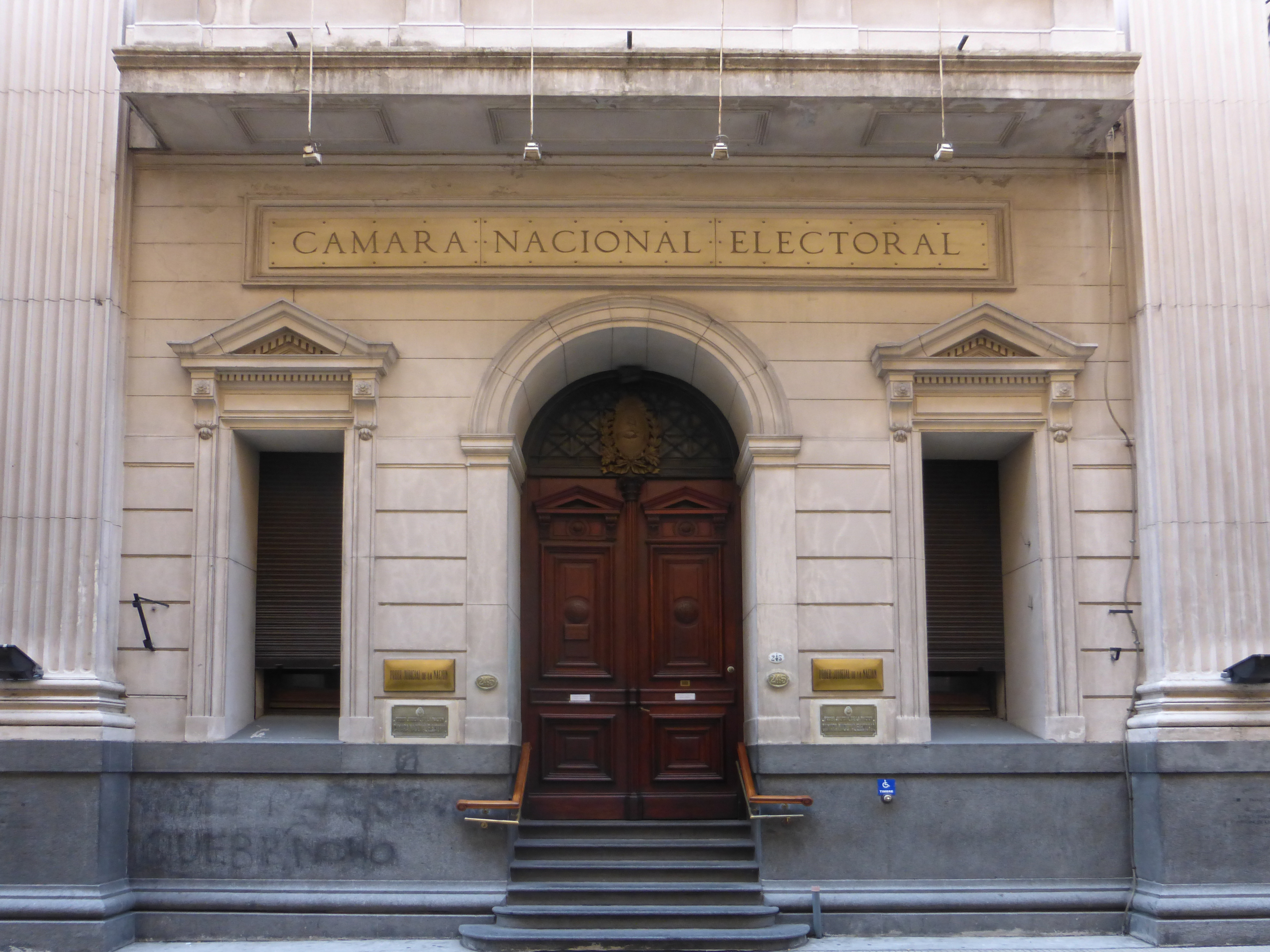 Edificio de la Comisión Nacional Electoral, ubicado en 25 de Mayo 245 del barrio porteño de San Nicolás.